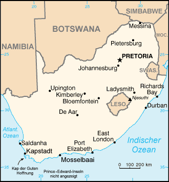 Südafrika-Karte